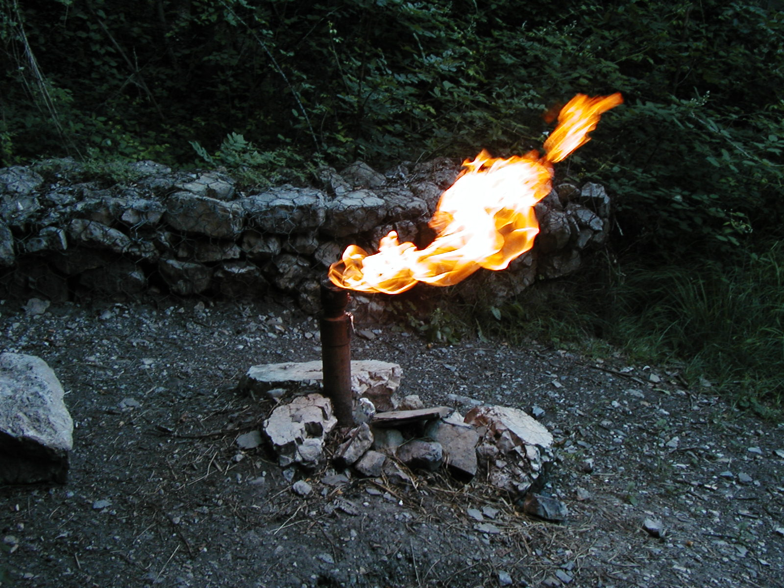 La Fontaine Ardente, Le Gua, Isère